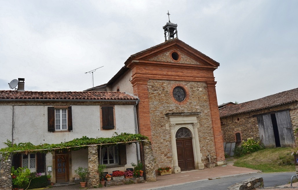 église Saint Pierre-es-lien